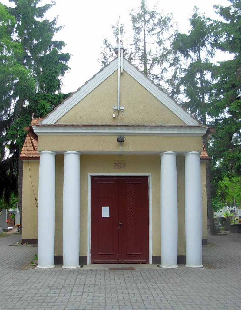 Cmentarz św. Mikołaja Bydgoszcz - kaplica, zbud. w okresie międzywojennym